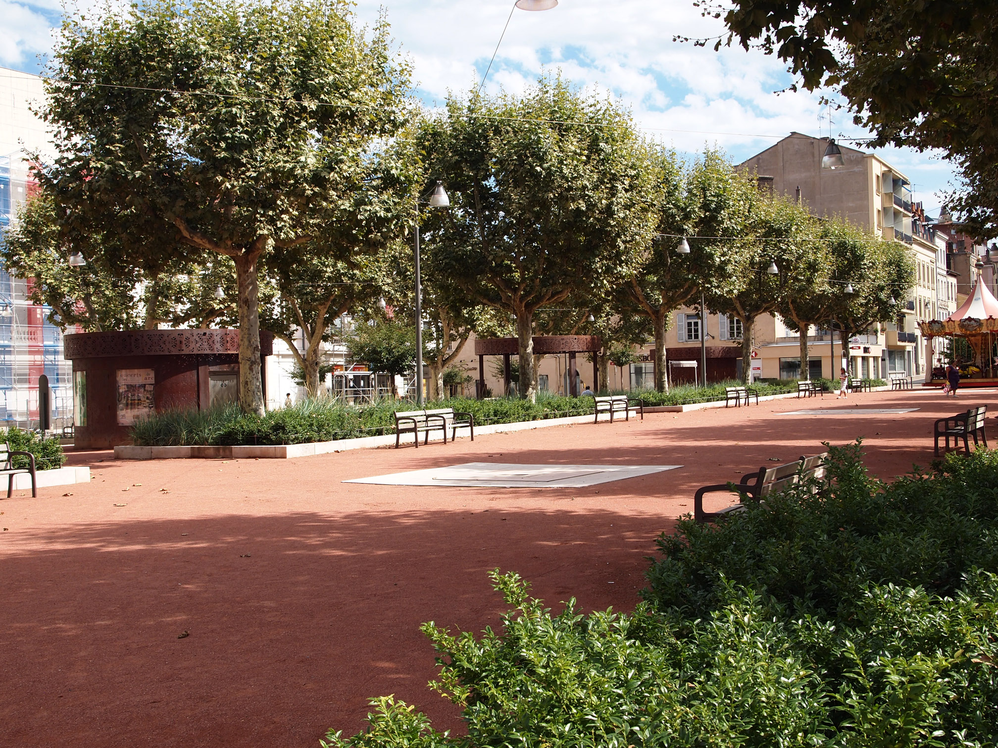 La place des arts à Villefranche-sur-Saône.